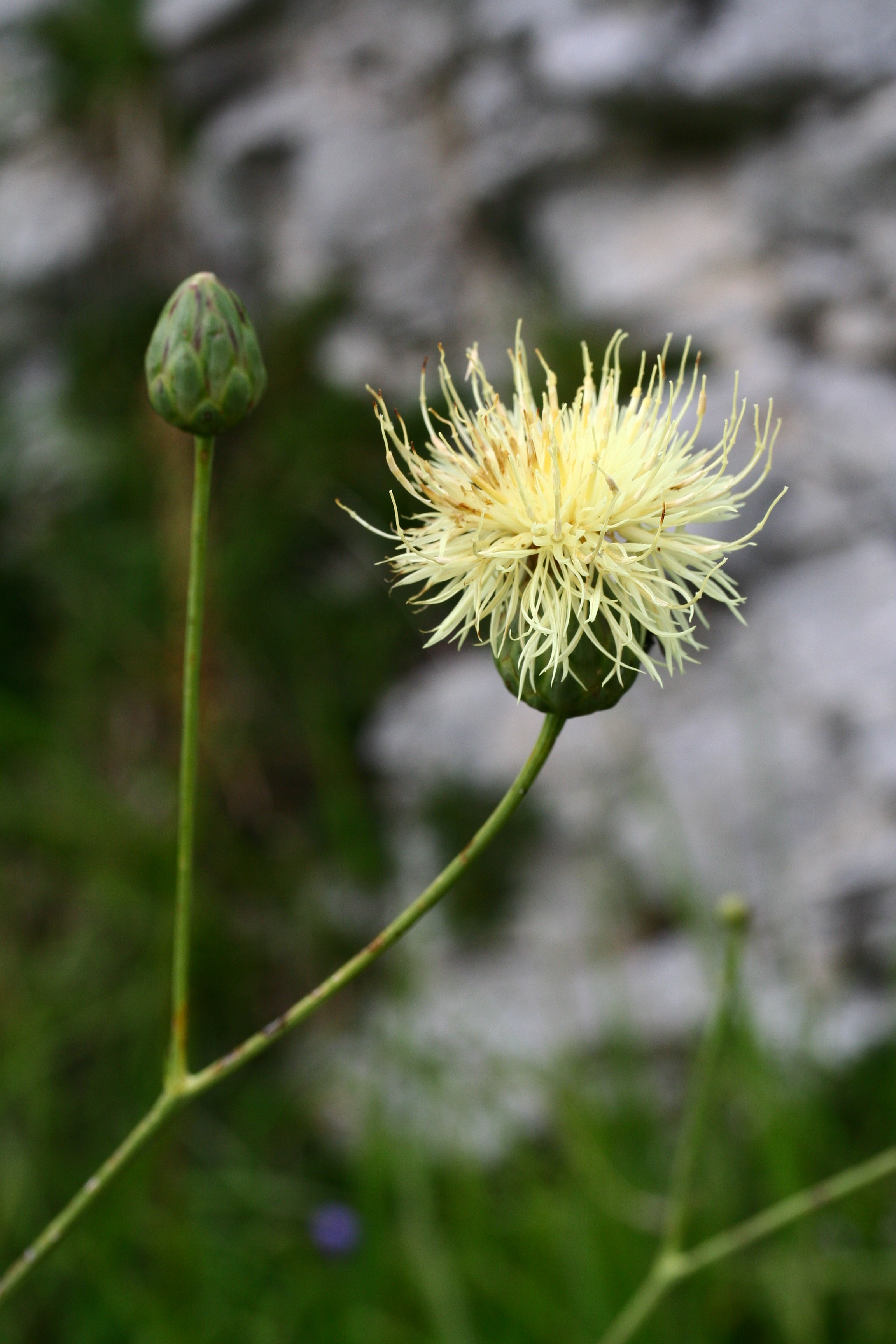 Rhaponticoides alpina (=Centaurea alpina) - Località: "Giardino Botanico delle Alpi Orientali", Monte Faverghera (BL), 1500 m s.l.m.